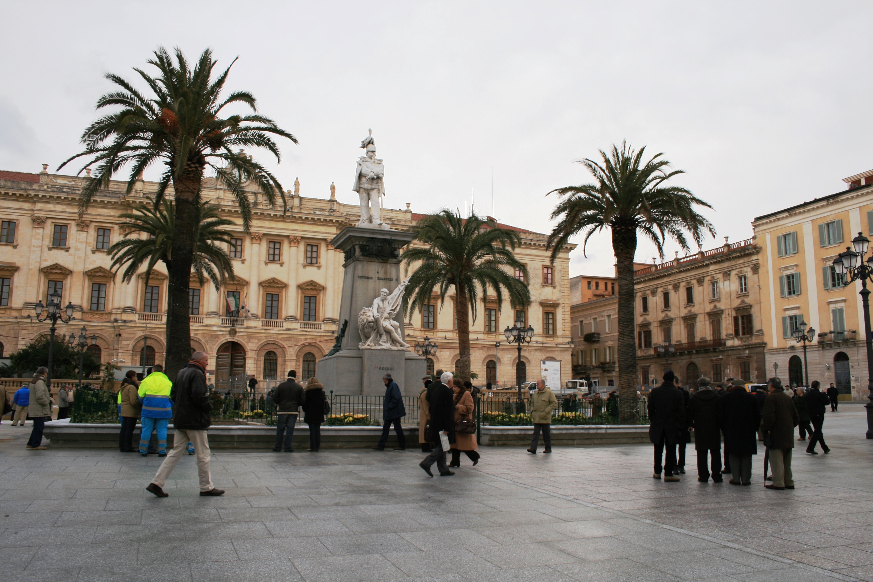 SASSARI - Le 4 palme attorno al monumento sono state "palificate" a scanso di crolli